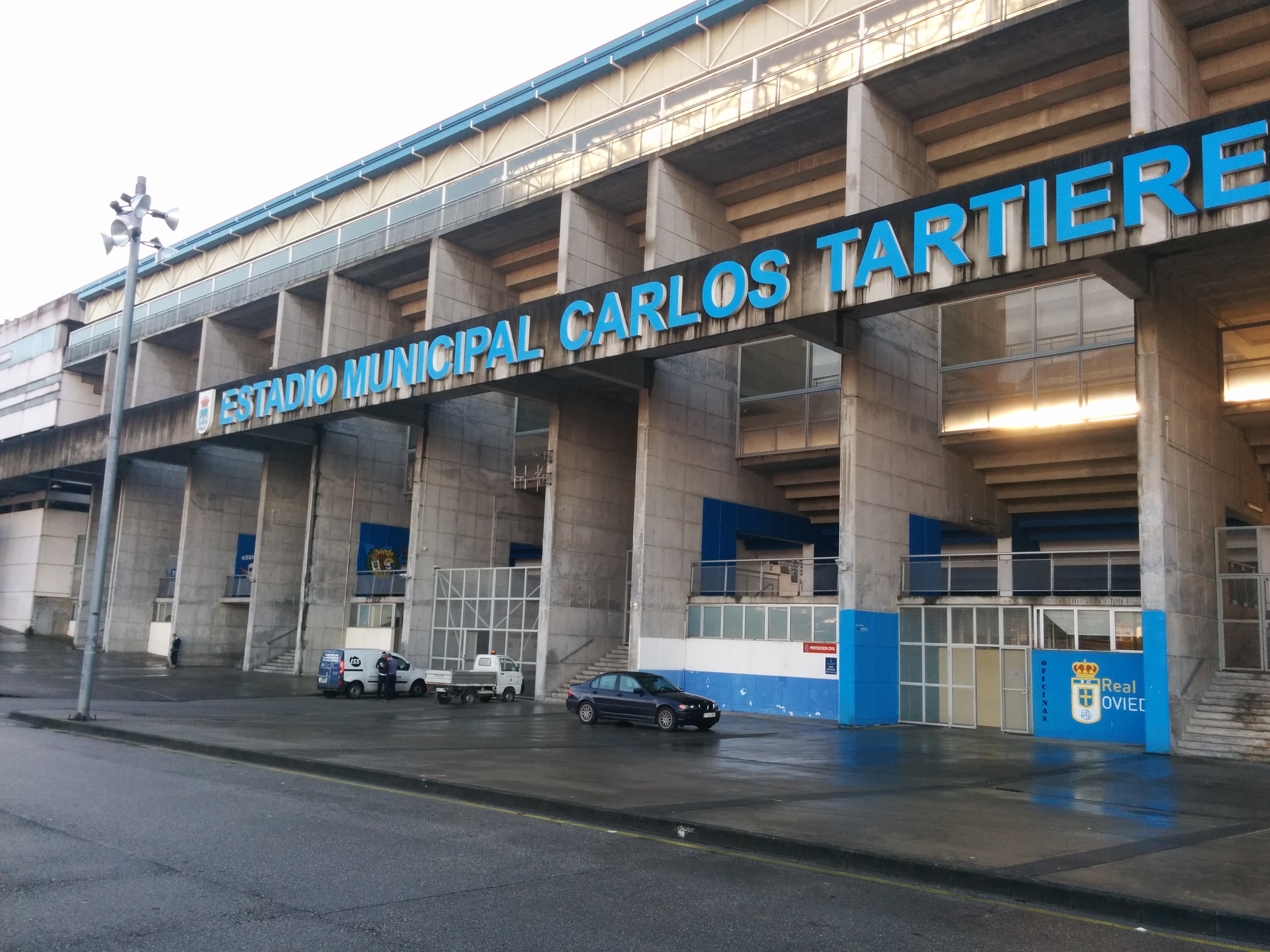 卡洛斯·塔尔蒂埃雷球场正门。